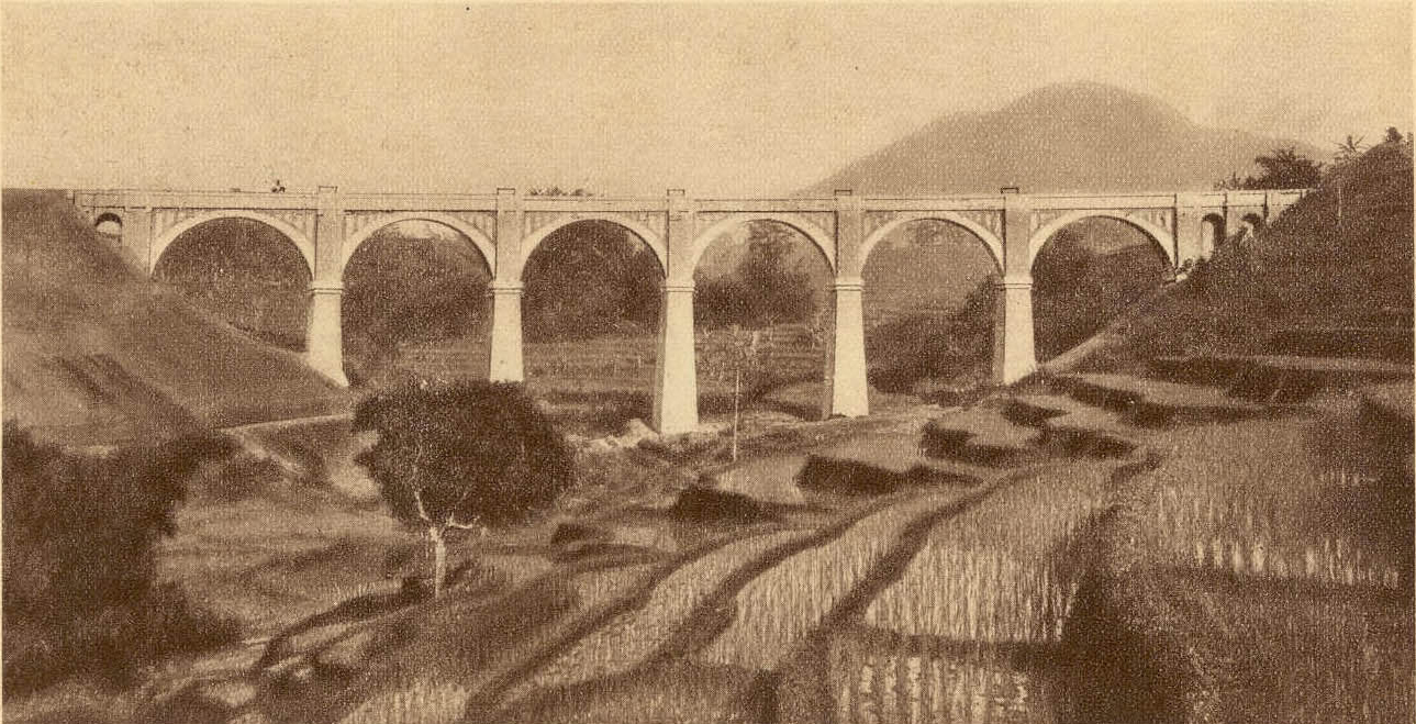 Jembatan CIkuda ketik masih aktif (1924) yang merupakan bagian dari jalur kereta api Rancaekek-Tanjungsari.